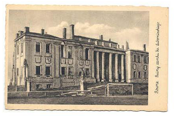 Футбольное поле у руин замка Любомирских